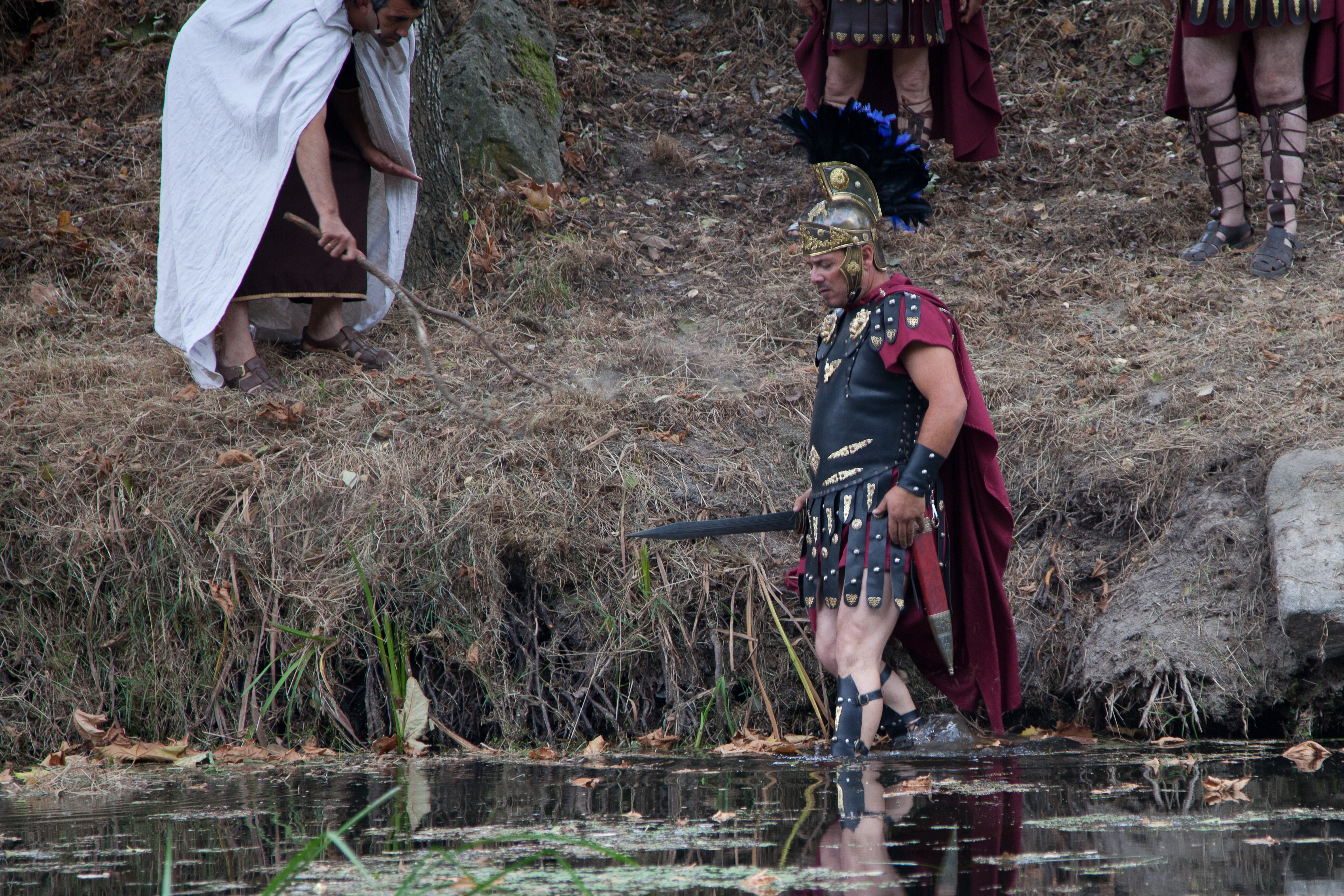 O paso do río Lethes. Festa do esquecemento. Xinzo de Limia, Ourense, Galicia.